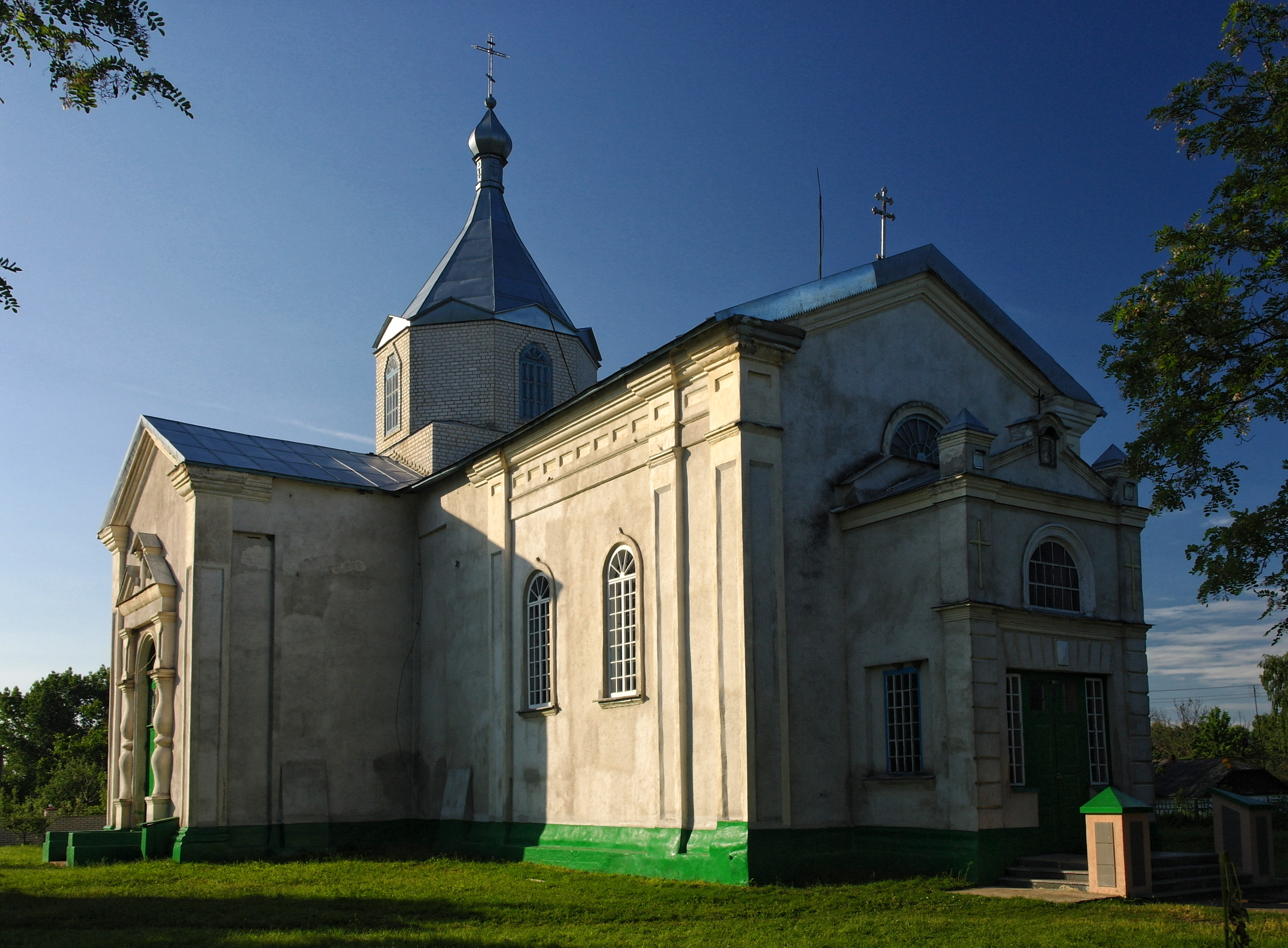 Червоне, Церква Св. Миколая